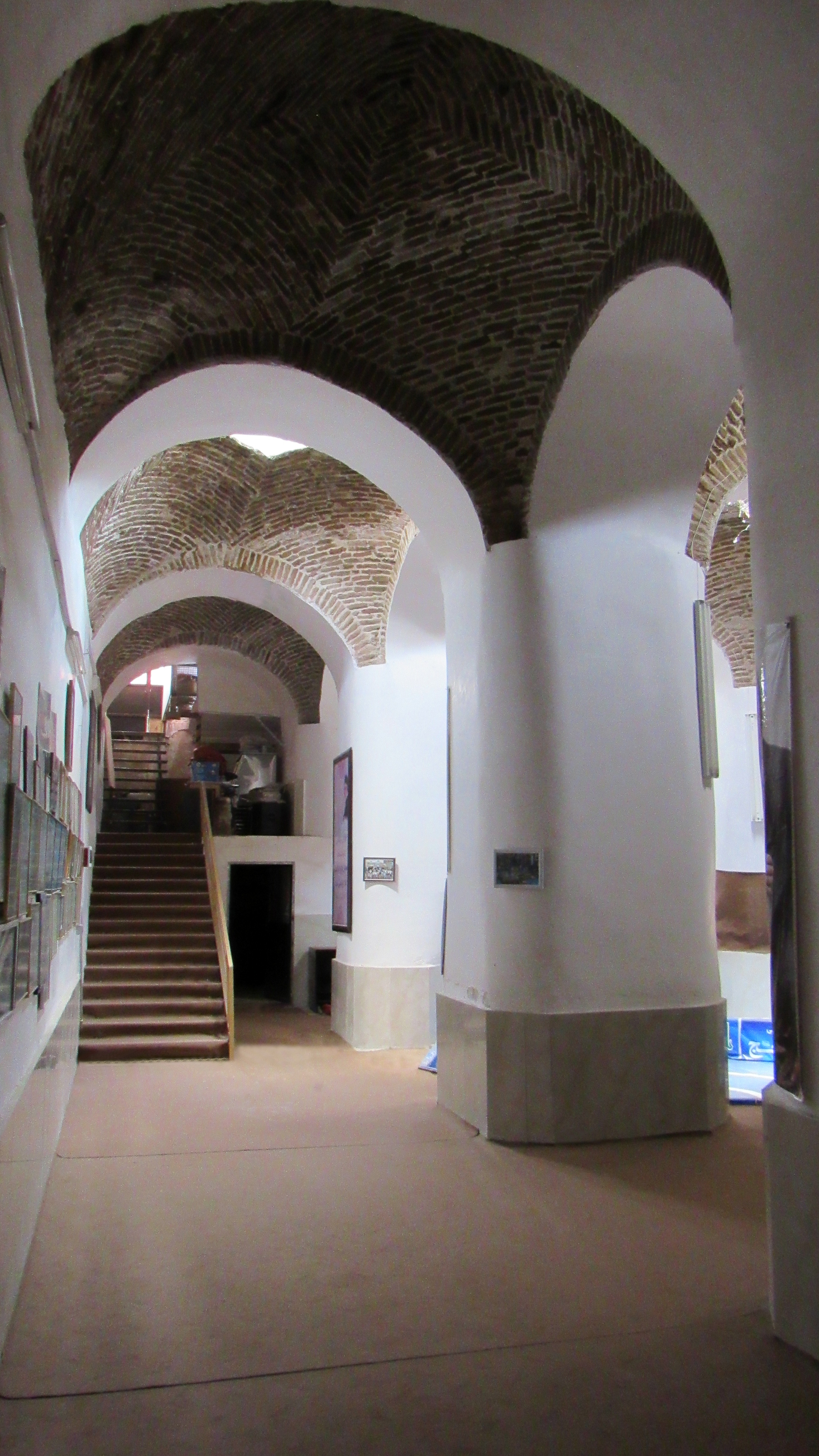 حوض هشت پایه سبزوار - مربوط به دوران سربداران